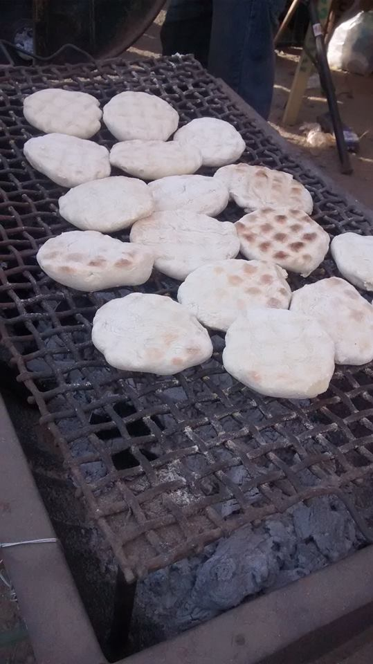 Tortillas en cocción para ser vendidas en la fonda del Estadio Nacional, durante las Fiestas Patrias de Chile.